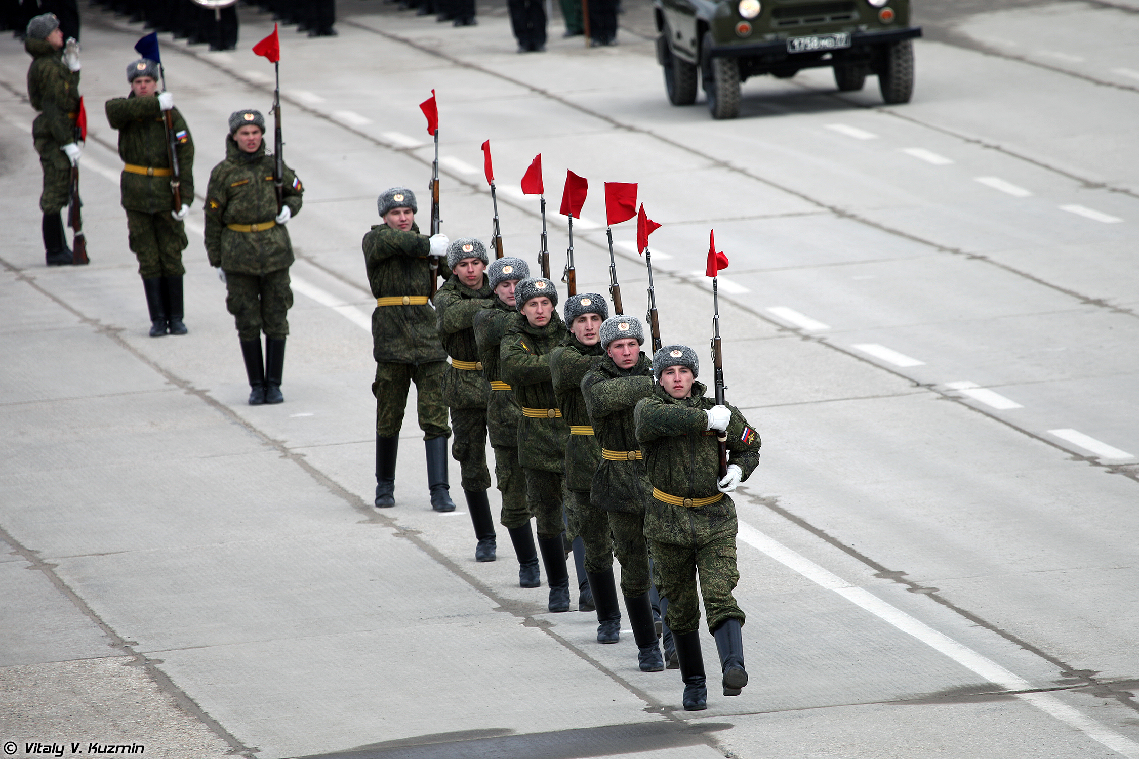 Линейные (Honour Guards)